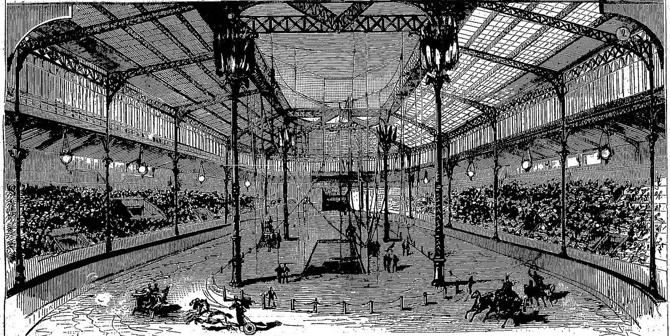 L'intérieure de l'hippodrome parisien du pont de l'Alma inauguré en 1878.